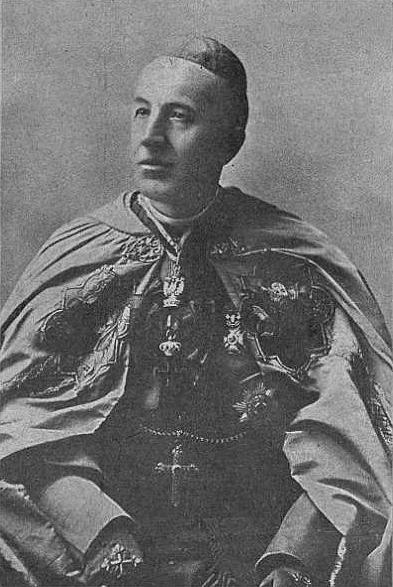 Єпископ Костянтин Чехович